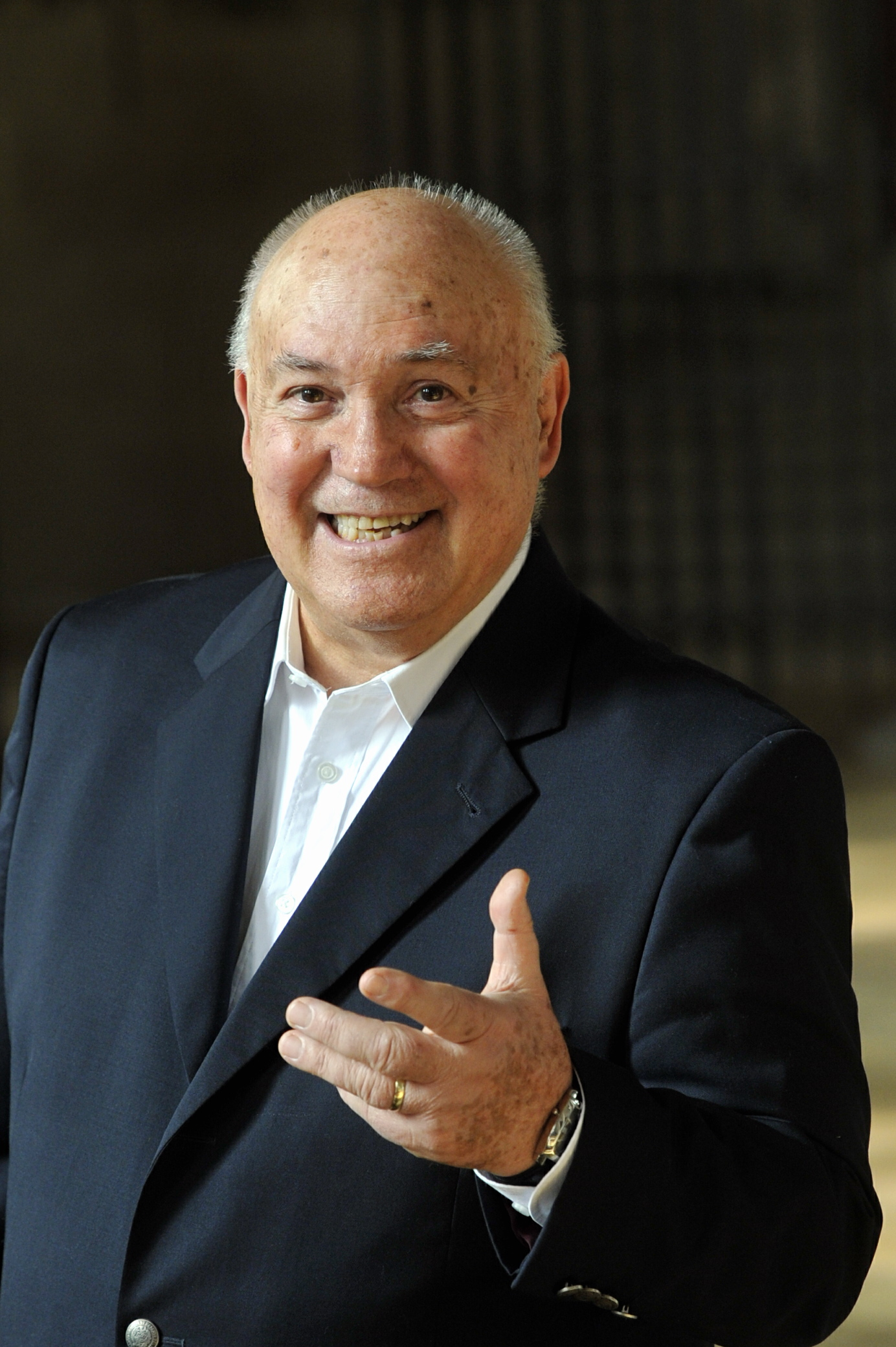 Hermann Wächter Künstler Schauspieler Heimatexperte Schriftsteller Autor Foto: Fred Schöllhorn